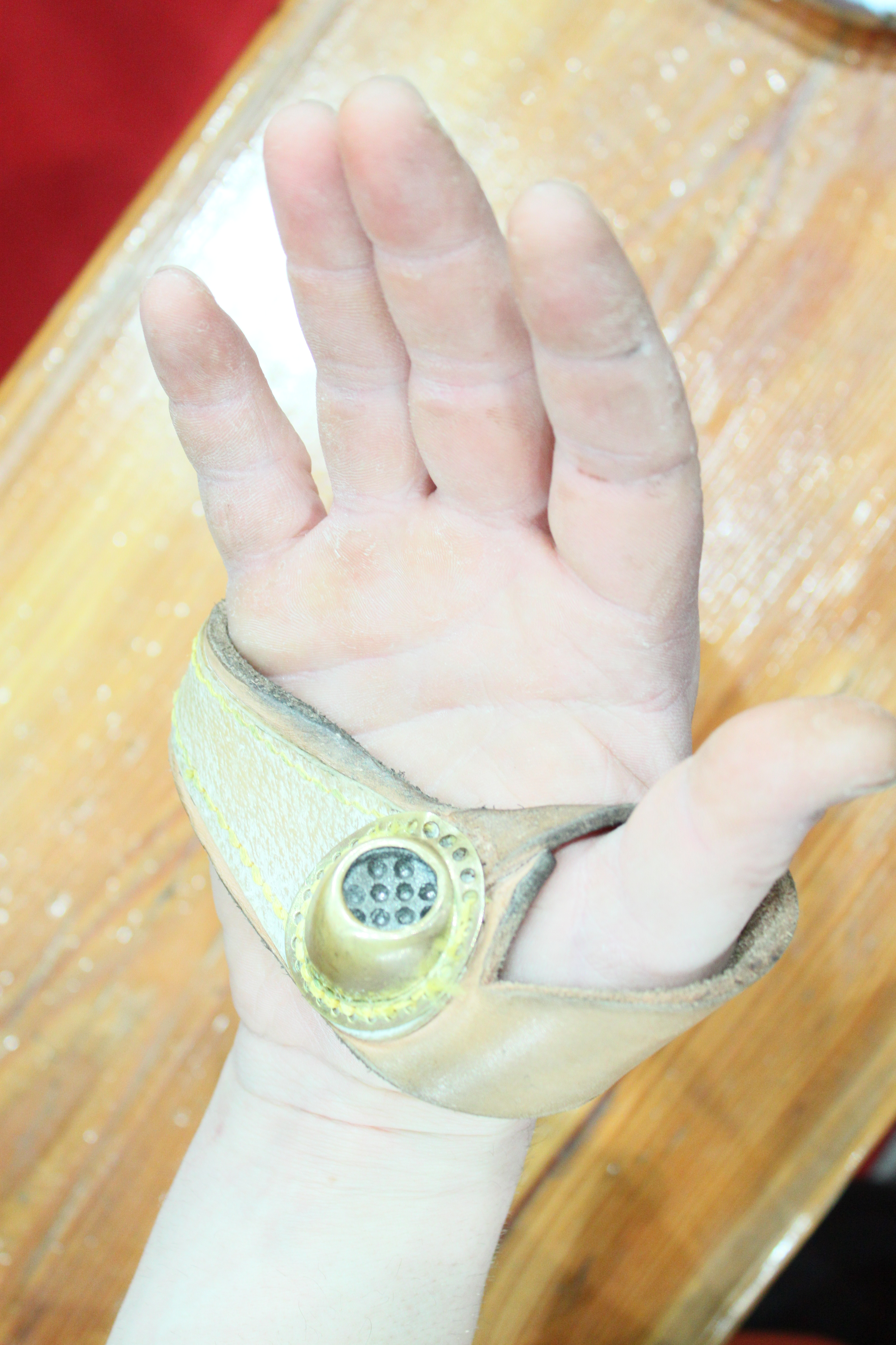 Segelmacherhandschuh , gesehen auf der Messe Bremen "Boot 2011"